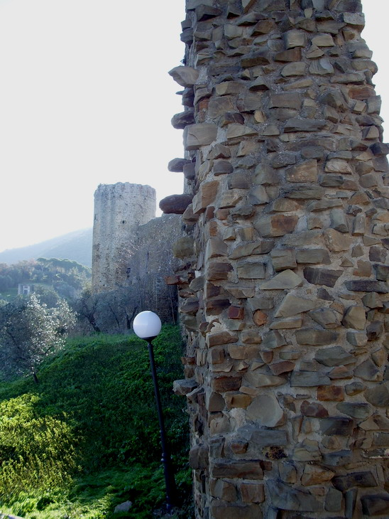 Le Mura di Scarlino presso la Rocca aldobrandesca